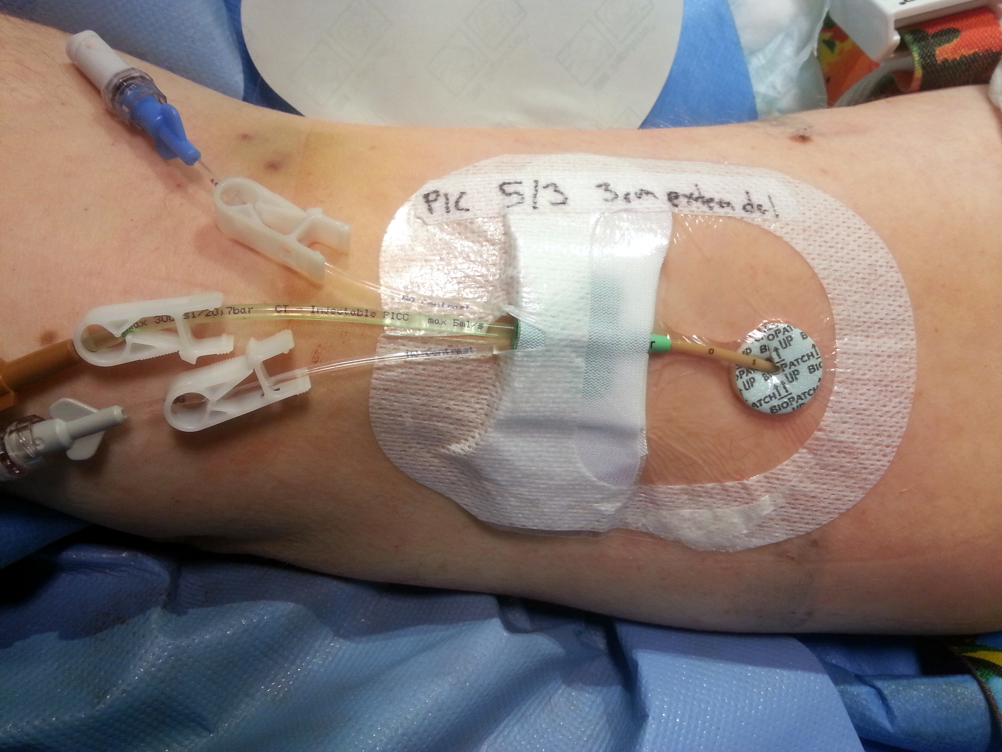 Omläggning av PICC